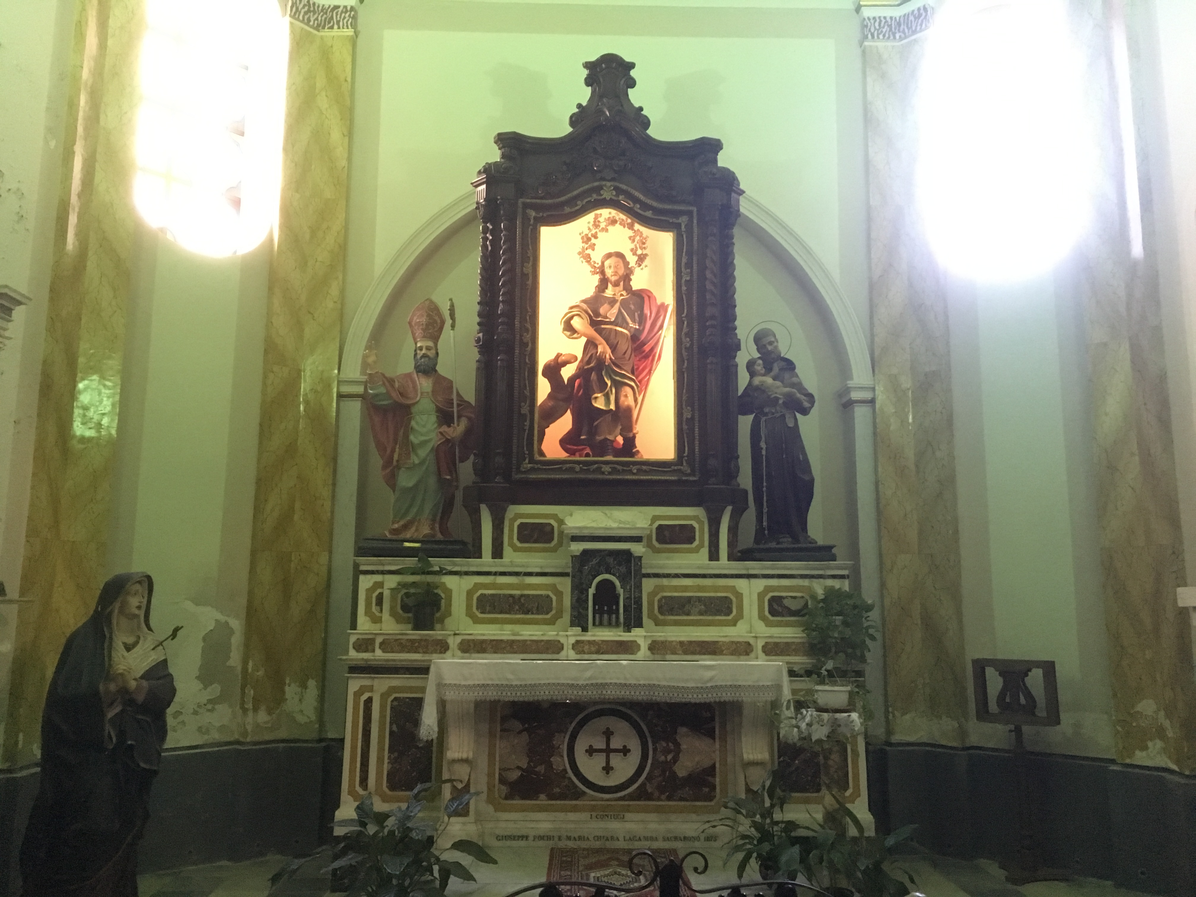 statuan in legno